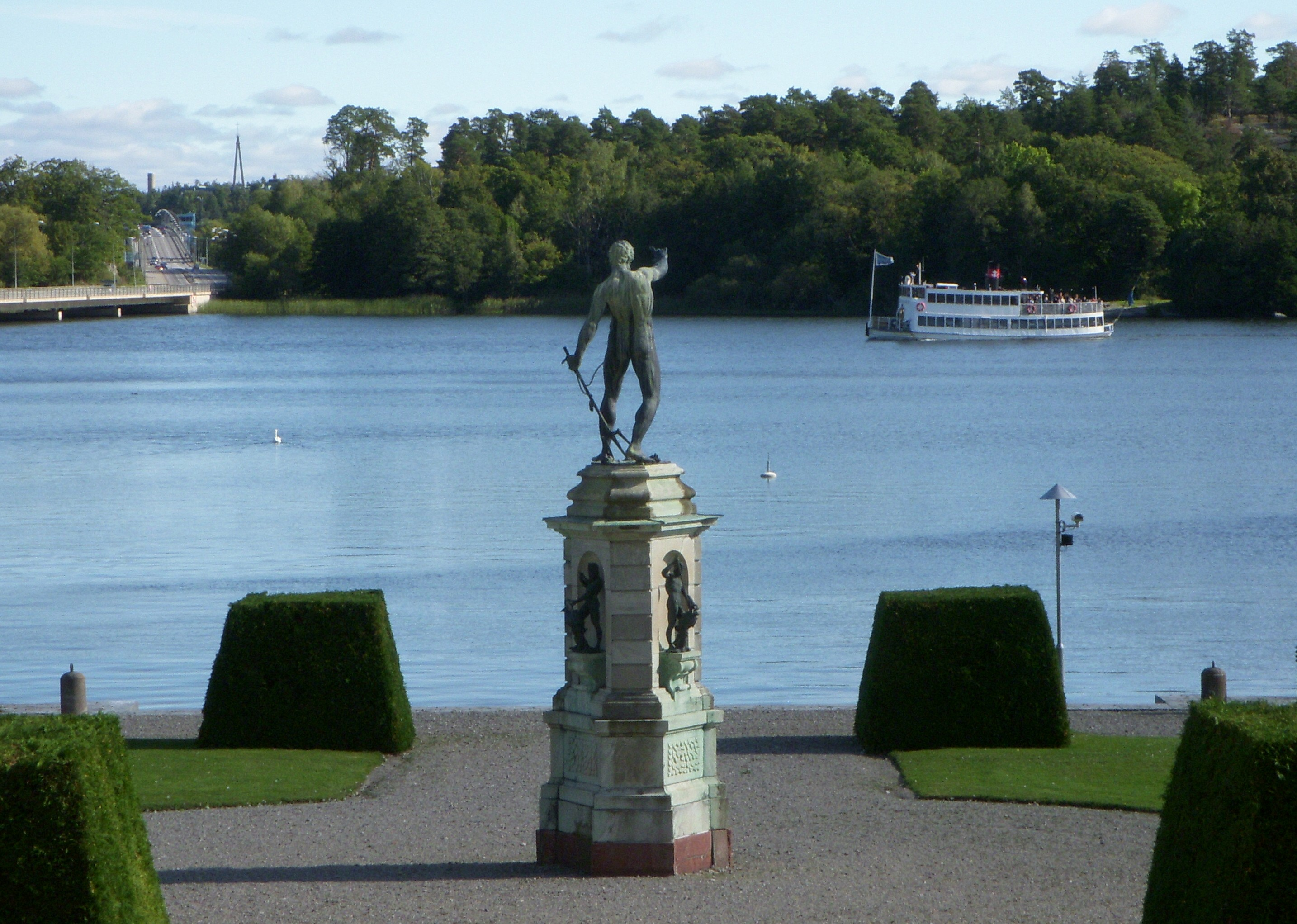 Drtottningholms slott, sjöparterren och Neptunus med treudd